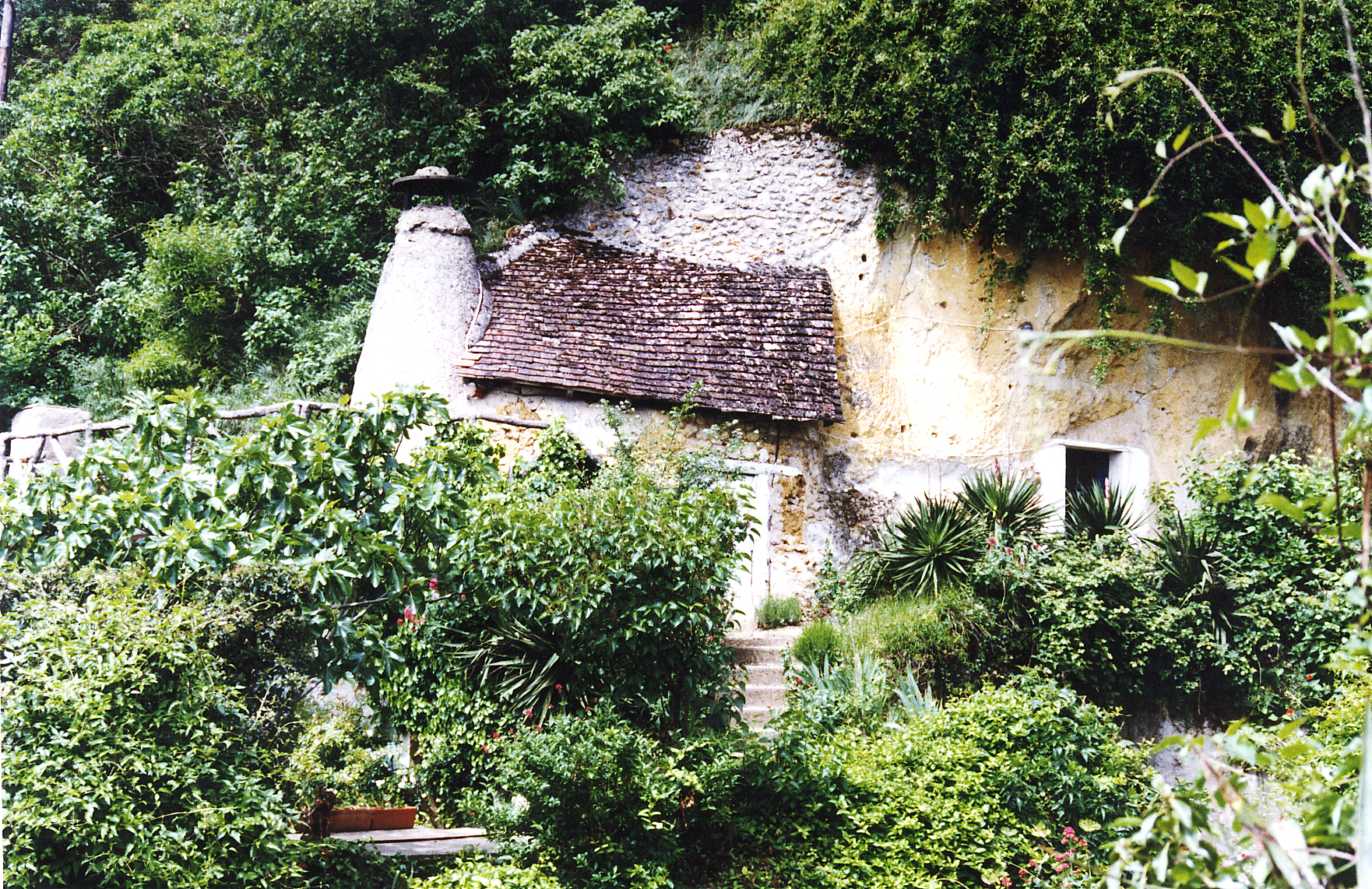 House in Loir-et-Cher, France